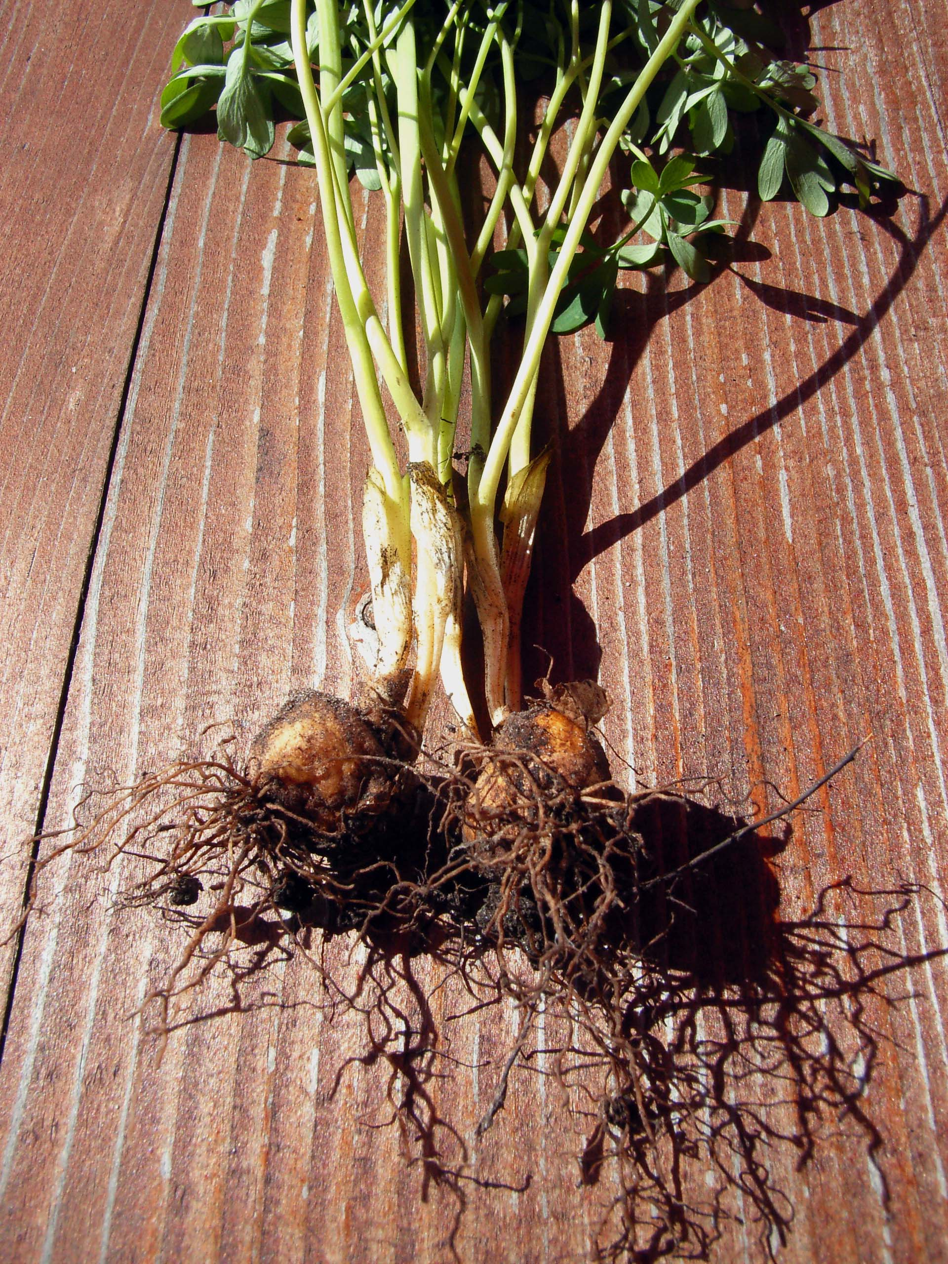 Wurzelknollen von Corydalis solida, eigener Garten